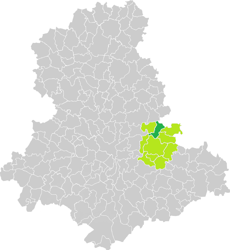 Carte de situation de la commune du Châtenet-en-Dognon (en vert foncé) dans le votre Canton (en vert clair) sur une carte des communes de la Haute-Vienne